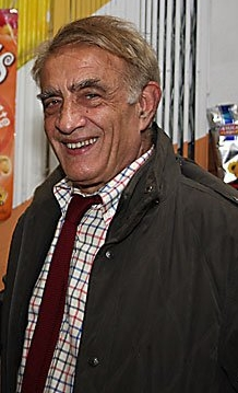 Franco Piperno